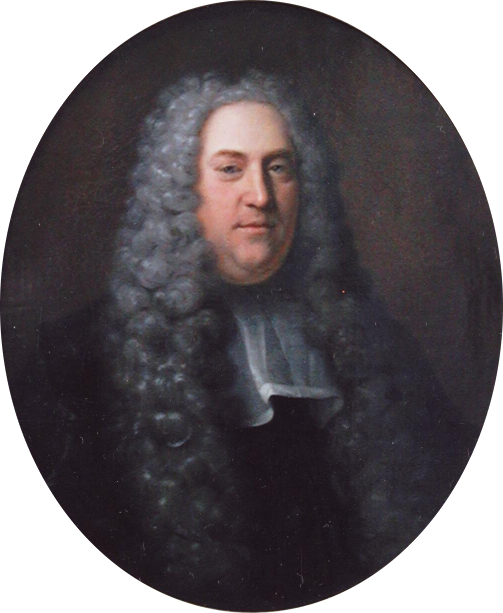 Johan van der Does (1694-1749), raadsheer Hoge Raad en thesaurier-generaal van de Republiek der Zeven Verenigde Nederlanden